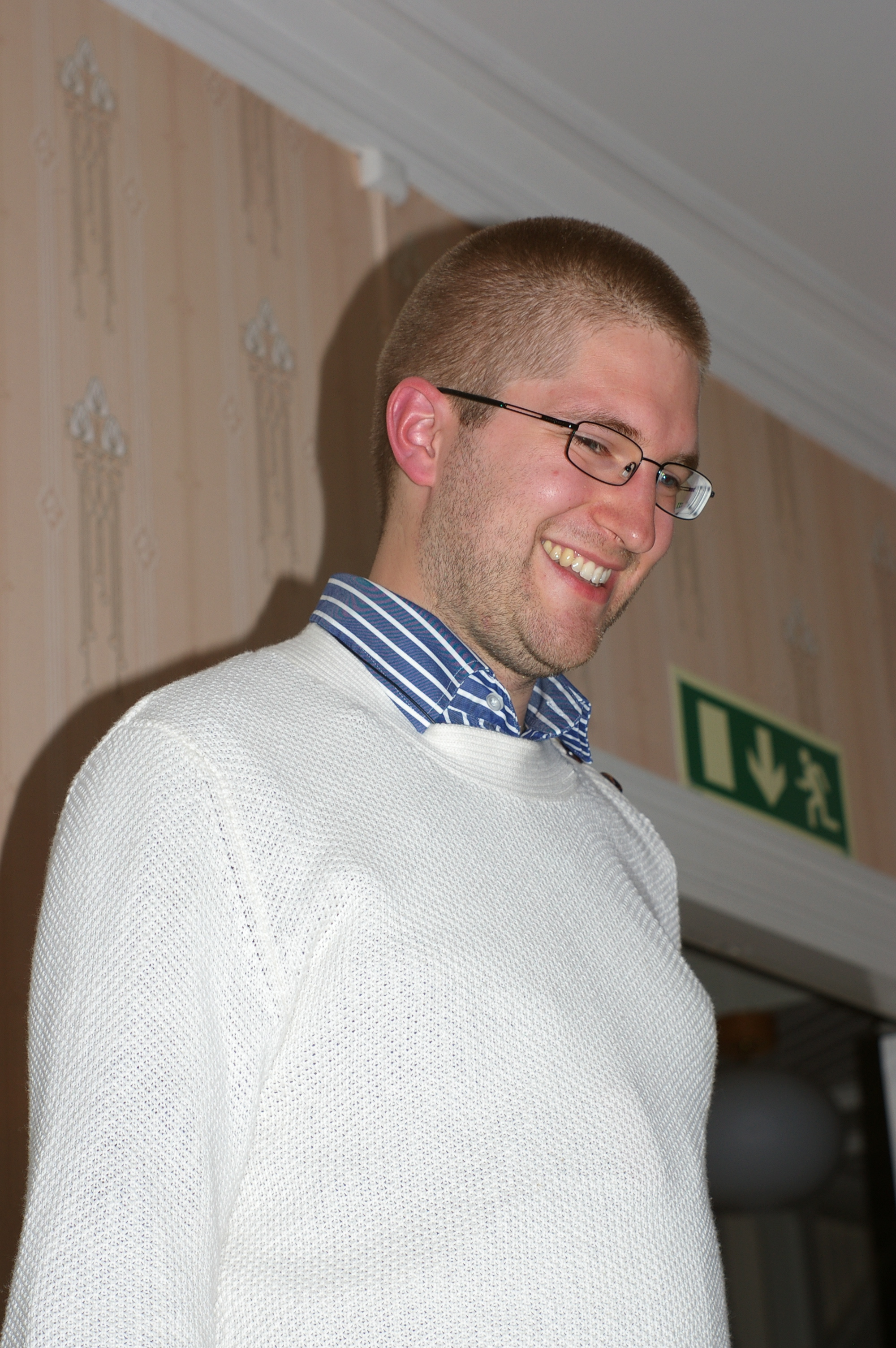 Carl Mäsak, sveda esperantisto kaj tiama prezidanto de SEJU, dum la Oranĝa Renkontiĝo 2008.